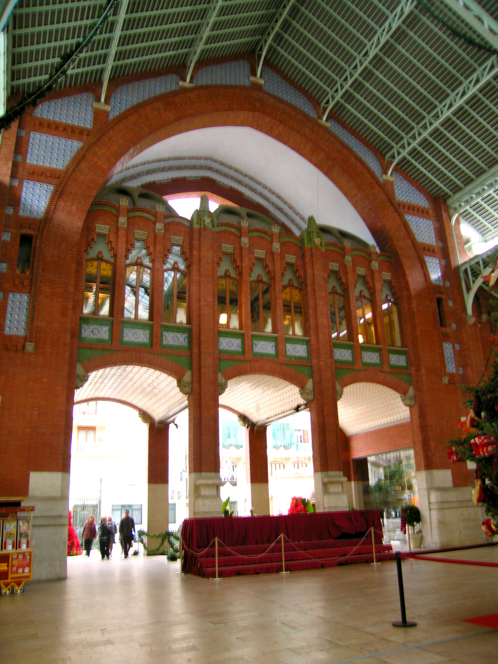 Restaurant a l'interior del Mercat de Colom (València)